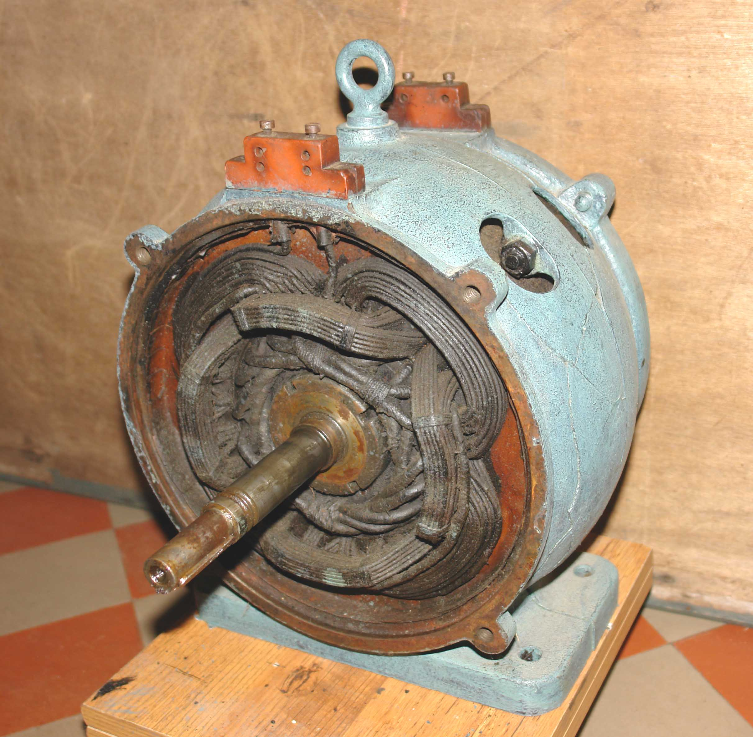 Moteur à induction, diphasé, fabriqué par R. Alioth et Cie, numéro 1042, daté vers 1891. Hormis sa date, l'intérêt de ce moteur réside dans le circuit du rotor, il est en effet l'ancêtre de la cage d'écureuil. Constitué d'un fil en cuivre épais branché en court-circuit, totalement isolé en double couche coton sur toute sa longueur et de surcroit gainé d'un autre isolant dans les encoches qui sont légèrement inclinées, que l'on distingue très bien sur cette photo. L'on peut voir aussi que les deux cotés du rotor sont eux aussi isolés. Cette fabrication complexe à été très éphémère car l'invention de la cage d'écureuil par Mikhaïl Dolivo-Dobrovolski plus simple de conception l'a très vitre remplacé. Quand aux bobinage du stator, il est lui aussi très intéressant. L'on peut noter le soin particulier apporté dans l'alignement des fils qui sied uniquement aux moteurs de cette époque et de la petite décennie suivante. Dans les quelques années antérieurs, c'est à dire depuis leur invention et leurs premières constructions industrielles qui remontent en1887-88, les stators de ces moteurs étaient simplement bobinés en anneau; l'on voit donc là un réel progres. En marge, il faut noter aussi l'intérêt historique car après bien des recherches, il est (à ma connaissance) le plus ancien moteur bobiné de la sorte. A d'autres d'apporter la preuve du contraire et de le faire figurer ici pour le plus grand bien de tous. Rappelons tout de même que la totalité des stators des moteurs à induction industriels triphasés et à cage d'écureuil actuels, sont bobinés de la sorte.